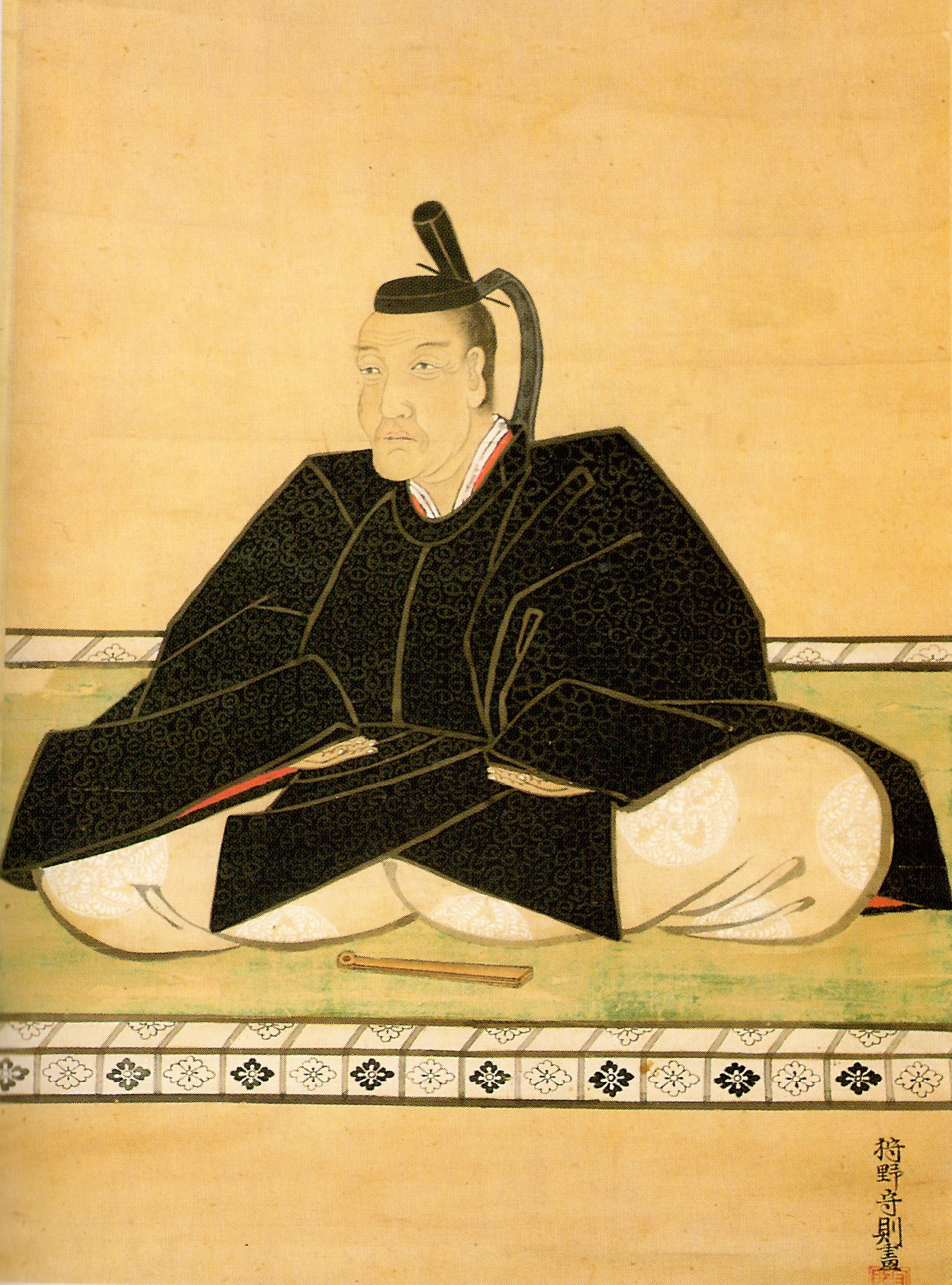 小倉実起の肖像。